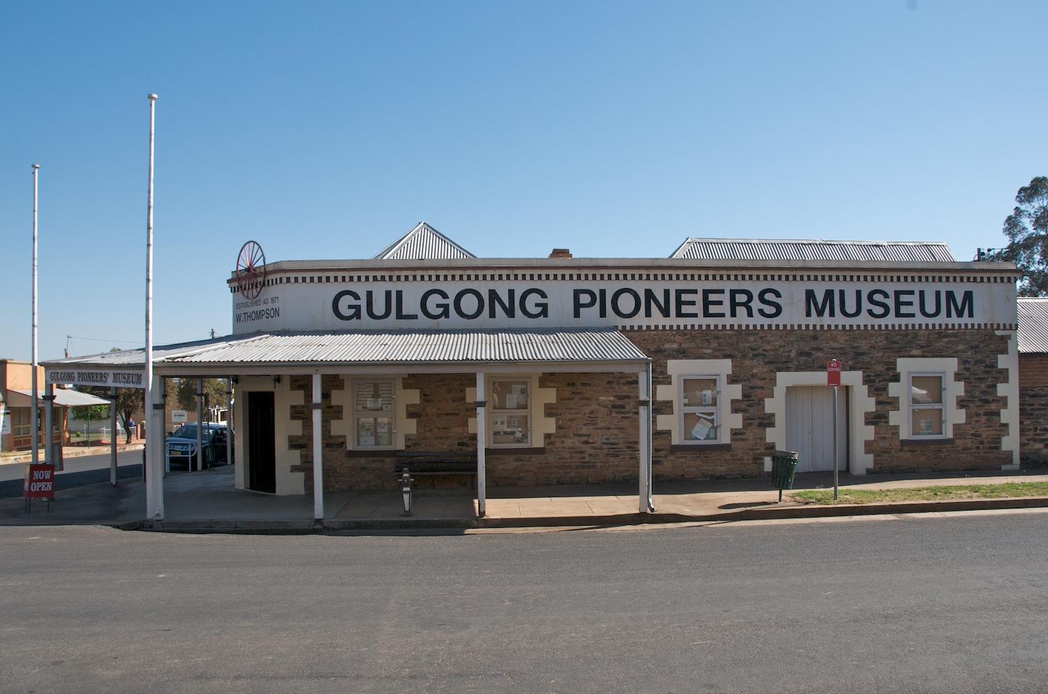 Herbert St, Gulgong, NSW